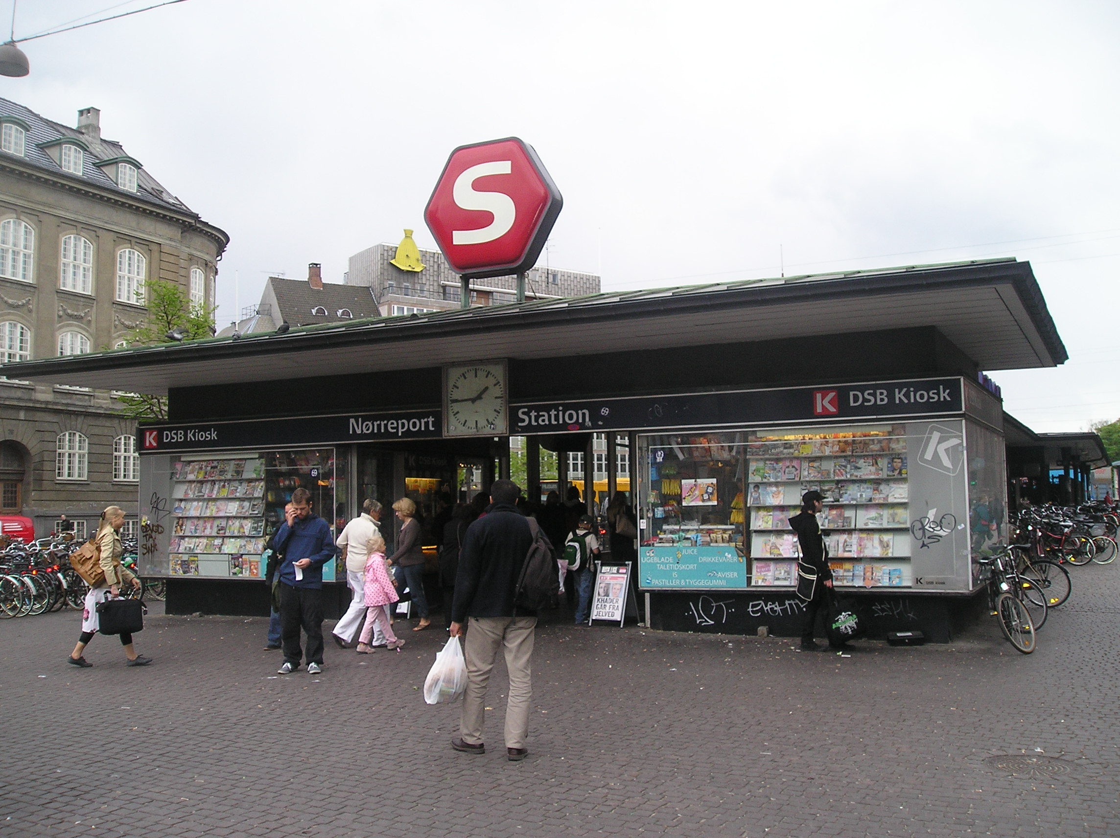 Nørreport Station in Copenhagen.